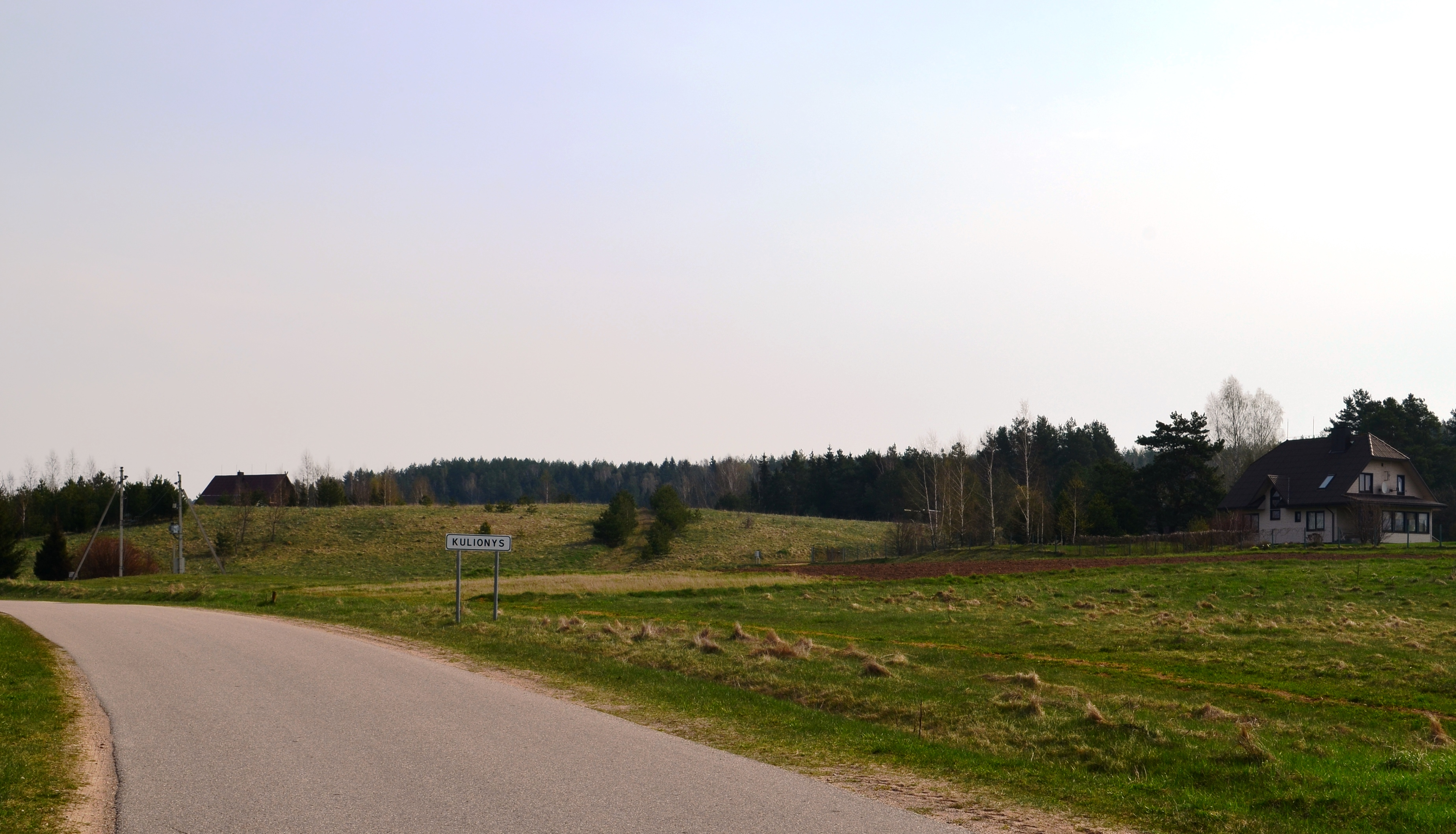 Įvažiavimas į Kulionis, Molėtų raj.